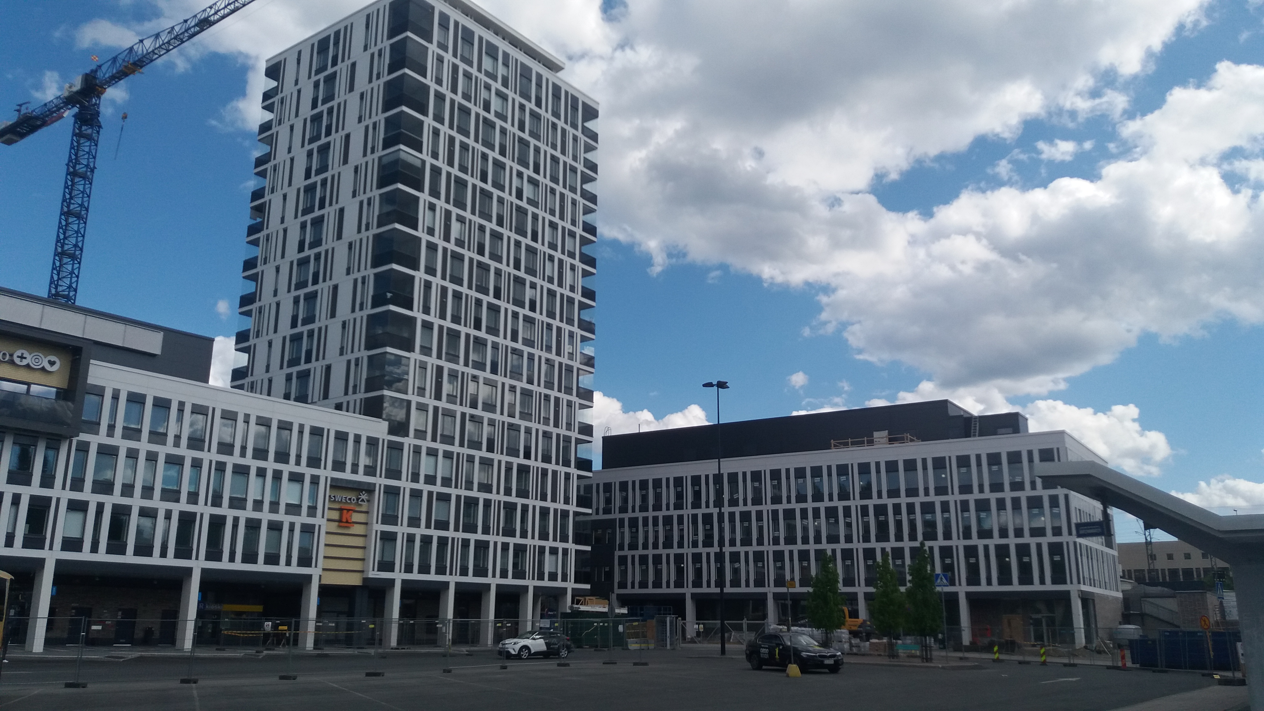 Kuopion Portin työmaa linja-autoaseman puolelta kesäkuussa 2020.